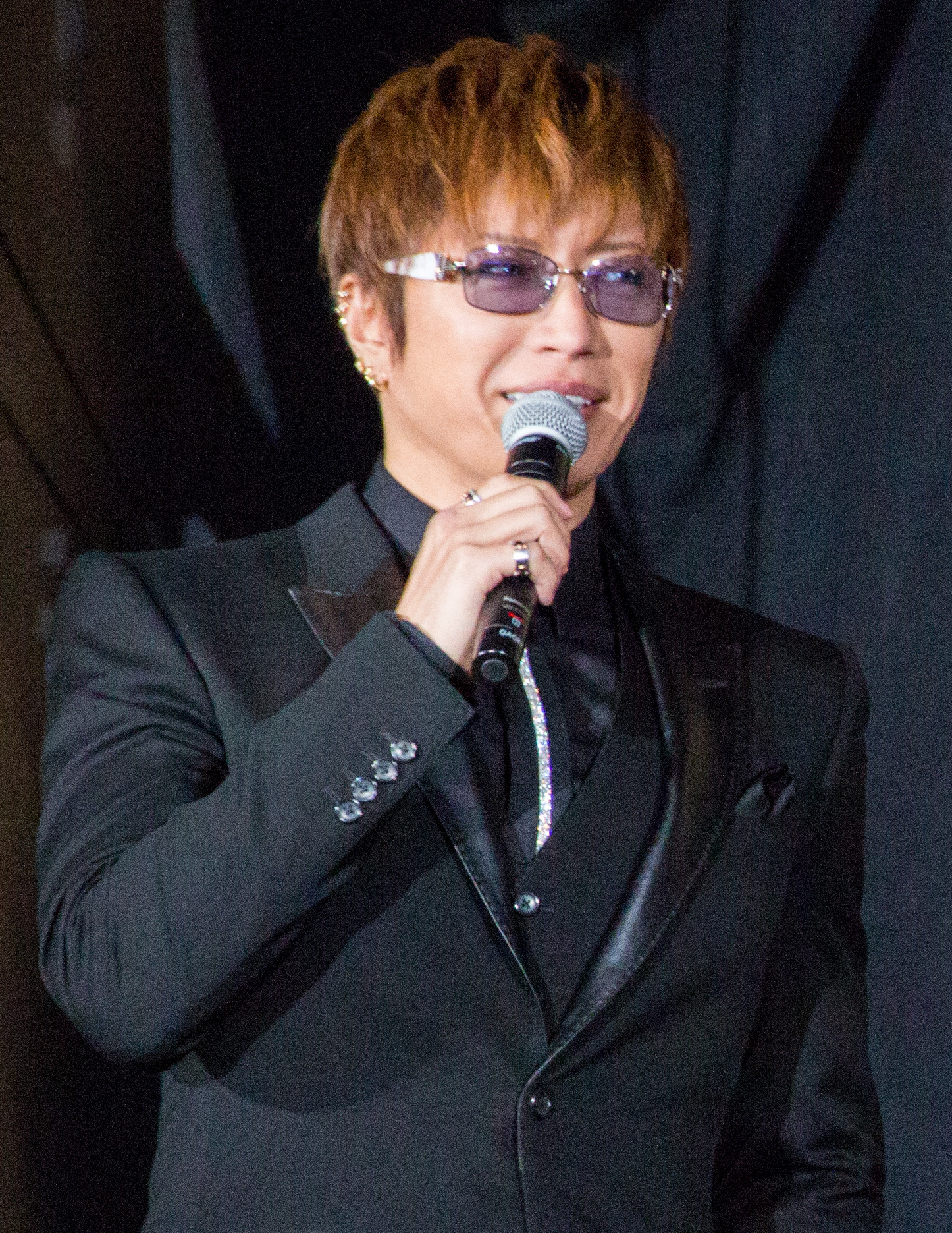 キングコング: 髑髏島の巨神 ジャパンプレミア レッドカーペット GACKT 佐々木希 トム・ヒドルストン